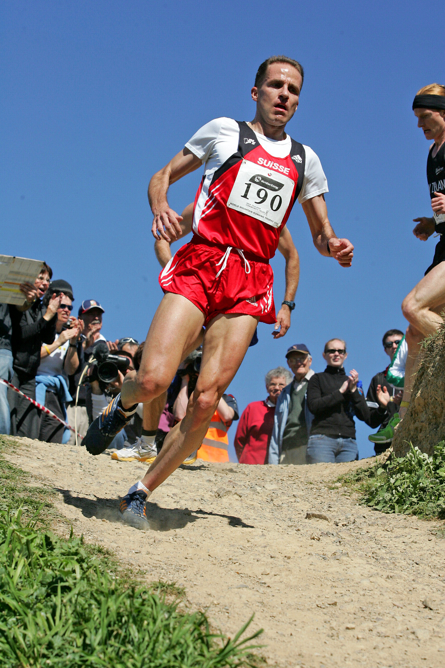 Sébastien Epiney lors des championnats du monde de course en montagne à Wellington (NZ) en 2005